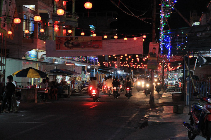 pribadi